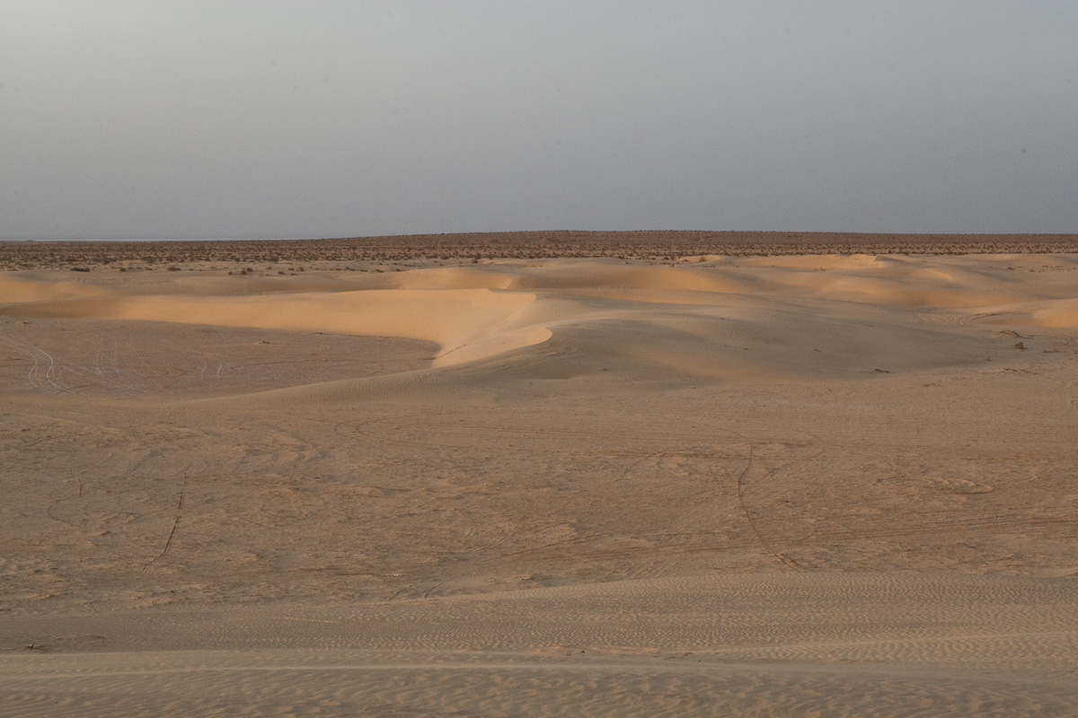 Tatooine. Miasteczko z "Gwiezdnych Wojen"